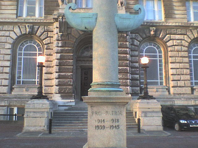 Krigsminnesmerke utenfor The Cunard Building.